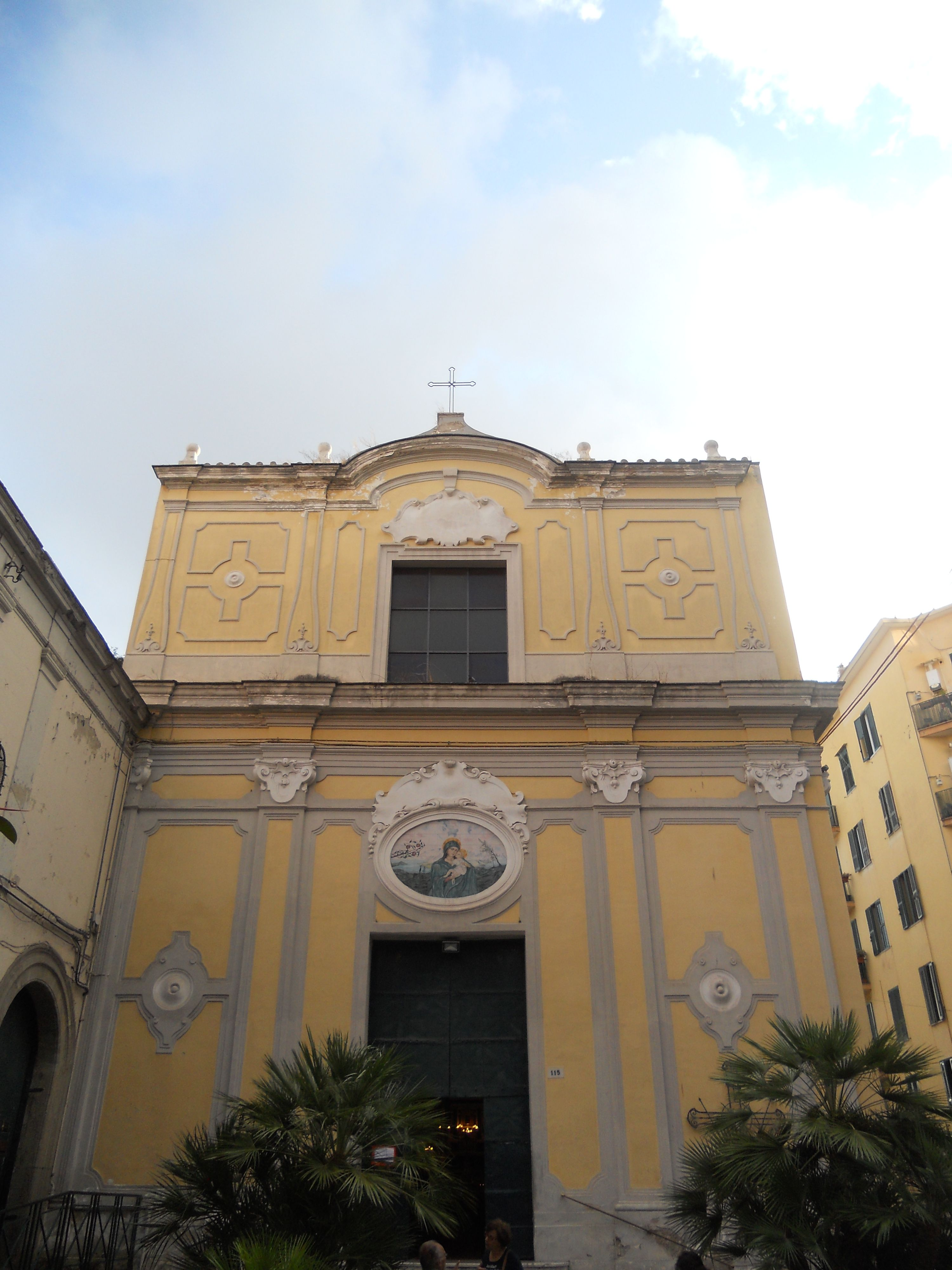 Chiesa di Santa Maria della Libera (Napoli)